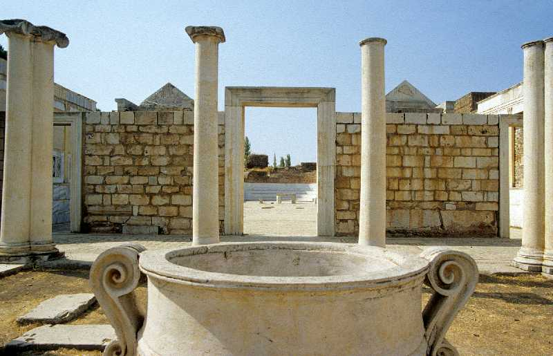 Synagoge, Sardes, Türkei